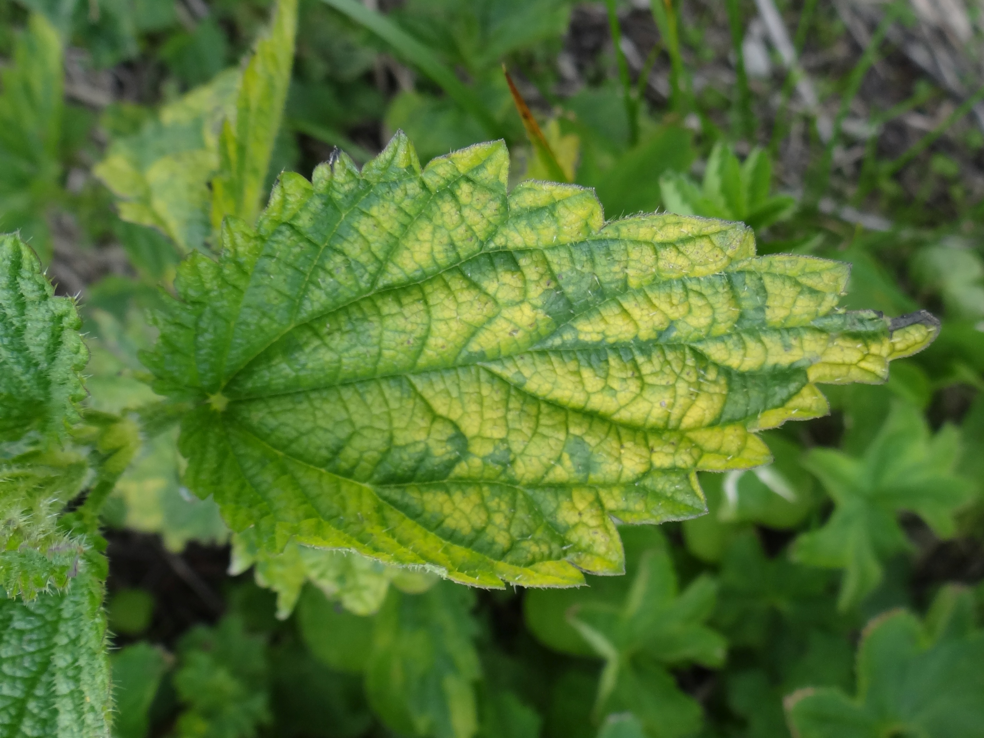 Urtica dioica